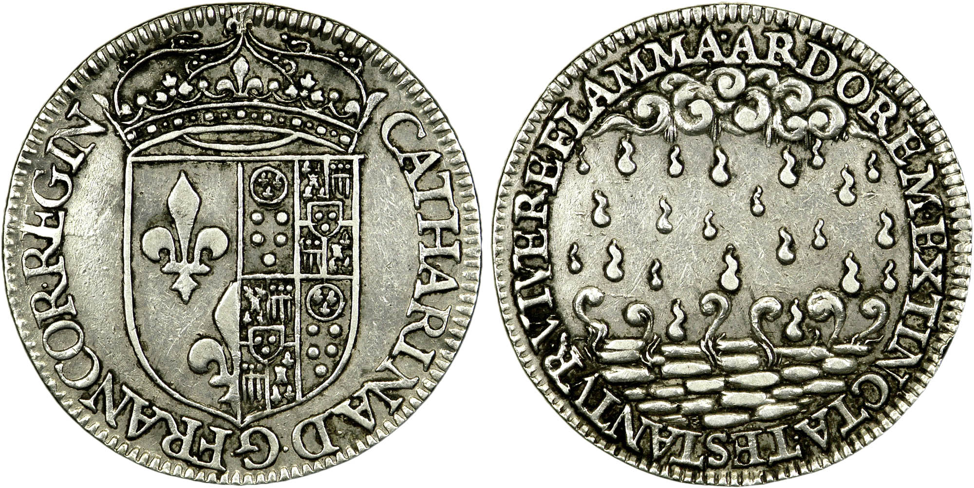 Nom de l'atelier : Paris Métal : argent Diamètre : 28mm Axe des coins : 6h. Poids : 4,99g. Tranche : lisse Titulature avers : CATHARINA. D. G. FRANCOR. REGIN. Description avers : Écu couronné parti de France et de Médicis. Traduction avers : (Catherine, par la grâce de Dieu, reine des Francs). Titulature revers : ARDOREM. EXTINCTA. TESTANTVR. VIVERE. FLAMMA. Description revers : Pluie en forme de larmes tombant du ciel sur des pierres de chaux vive qui la vaporisent. Traduction revers : (La vivacité des flammes témoigne de l'ardeur éteinte). Commentaire :Ce jeton est sur la partition gauche écartelé en 1 et 4 de Médicis, (d’or, à cinq besants posés deux, deux et un, de gueules, accompagnés en chef d'un besant plus gros d'azur, chargé de trois fleurs de lys d'or) et en 2 et 3 contrécartelé de La Tour-Auvergne-Boulogne (en 1 et 4 d'azur semé de fleurs de lis d'or, à la tour brochante d'argent, maçonnée de sable ; en 2 et 3 d'or au gonfanon de gueules aux trois pendants frangés de sinople ; en cœur Boulogne à trois tourteaux de gueules).